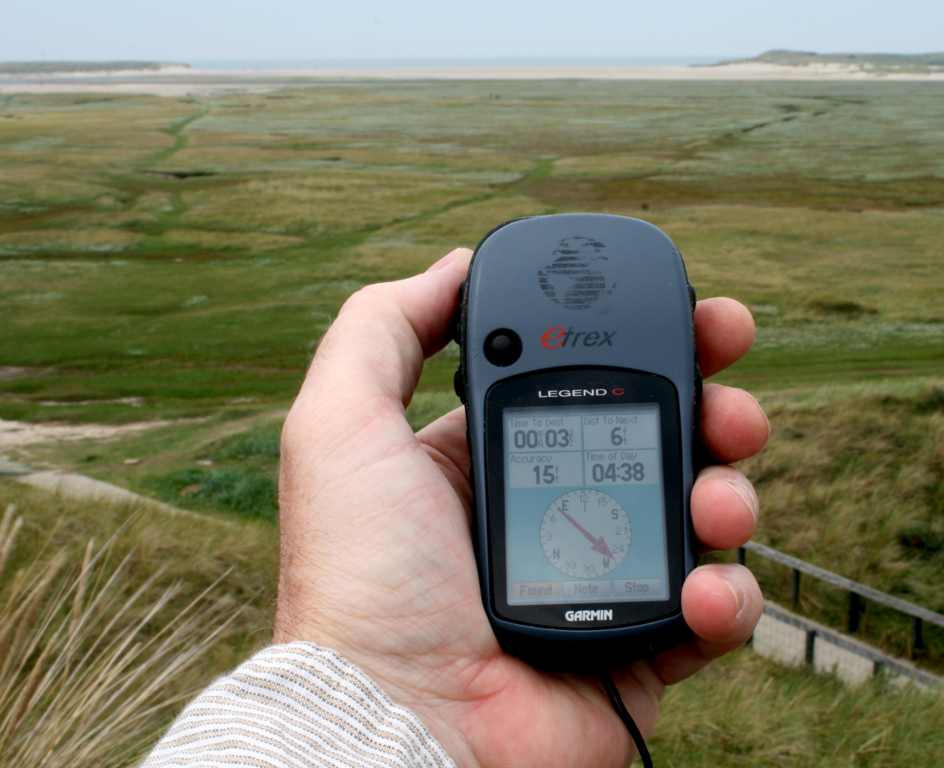 Earthcache De Slufter